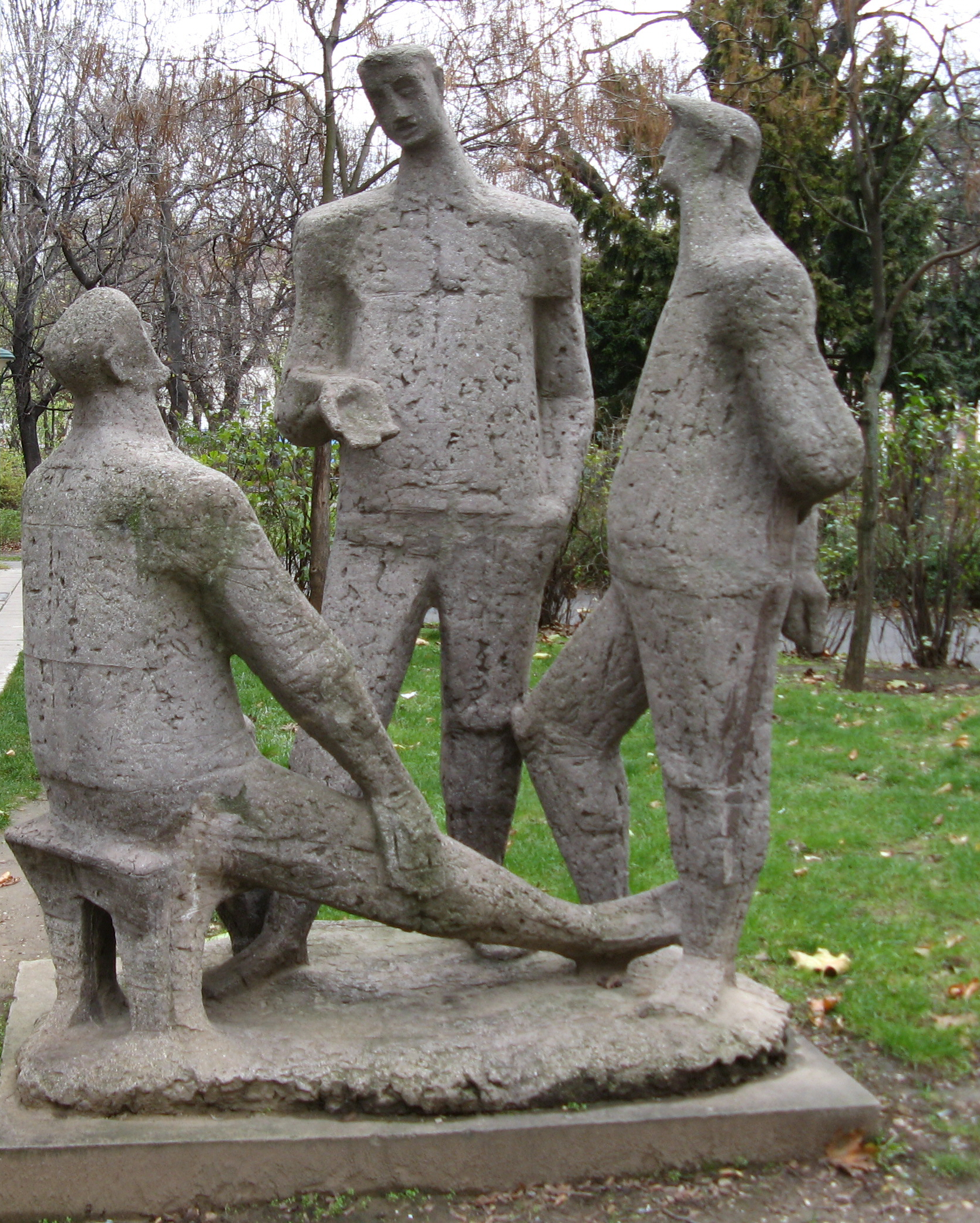 "Diskussion" (1961), Kunststein, Höhe 260cm, von Gottfried Buchberger, Volkshochschule Favoriten, Arthaberpark, Wien-Favoriten